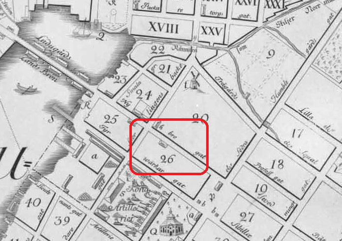 Del av Petrus Tillaeus "General Charta öfwer Stockholm med Malmarne Åhr 1733" visande Apoteket Hvita Biörn (nr 26)